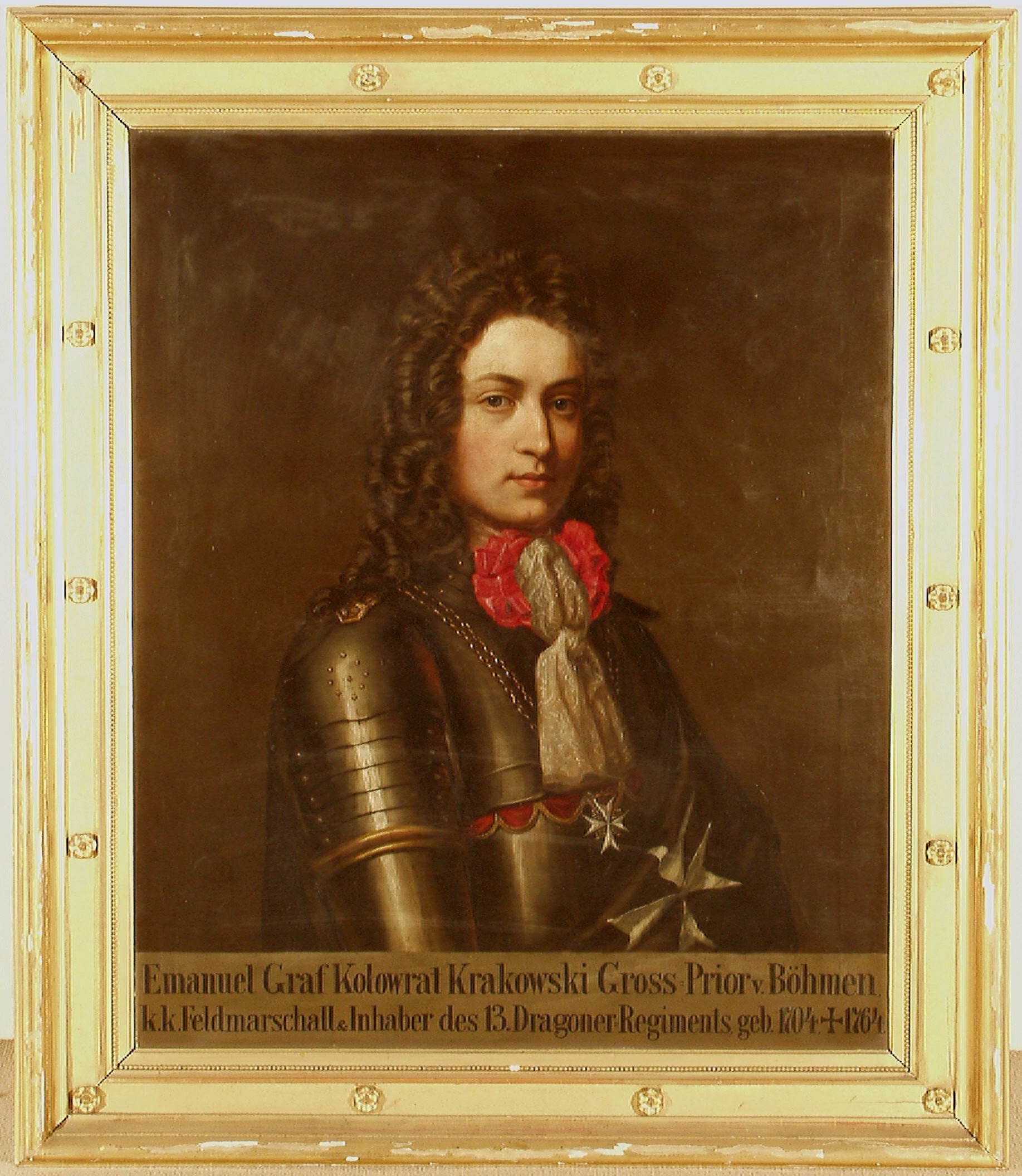 Emanuel Václav hrabě Krakowský z Kolowrat